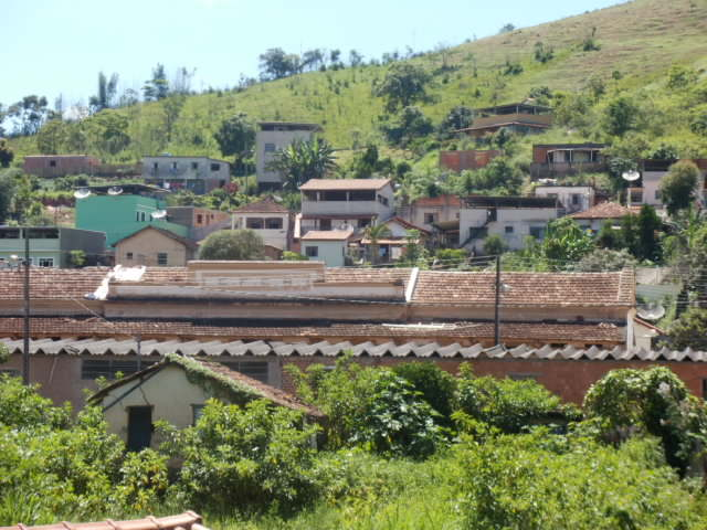 Vista do bairro Santa Terezinha, em Lima Duarte, Minas Gerais, Brasil.